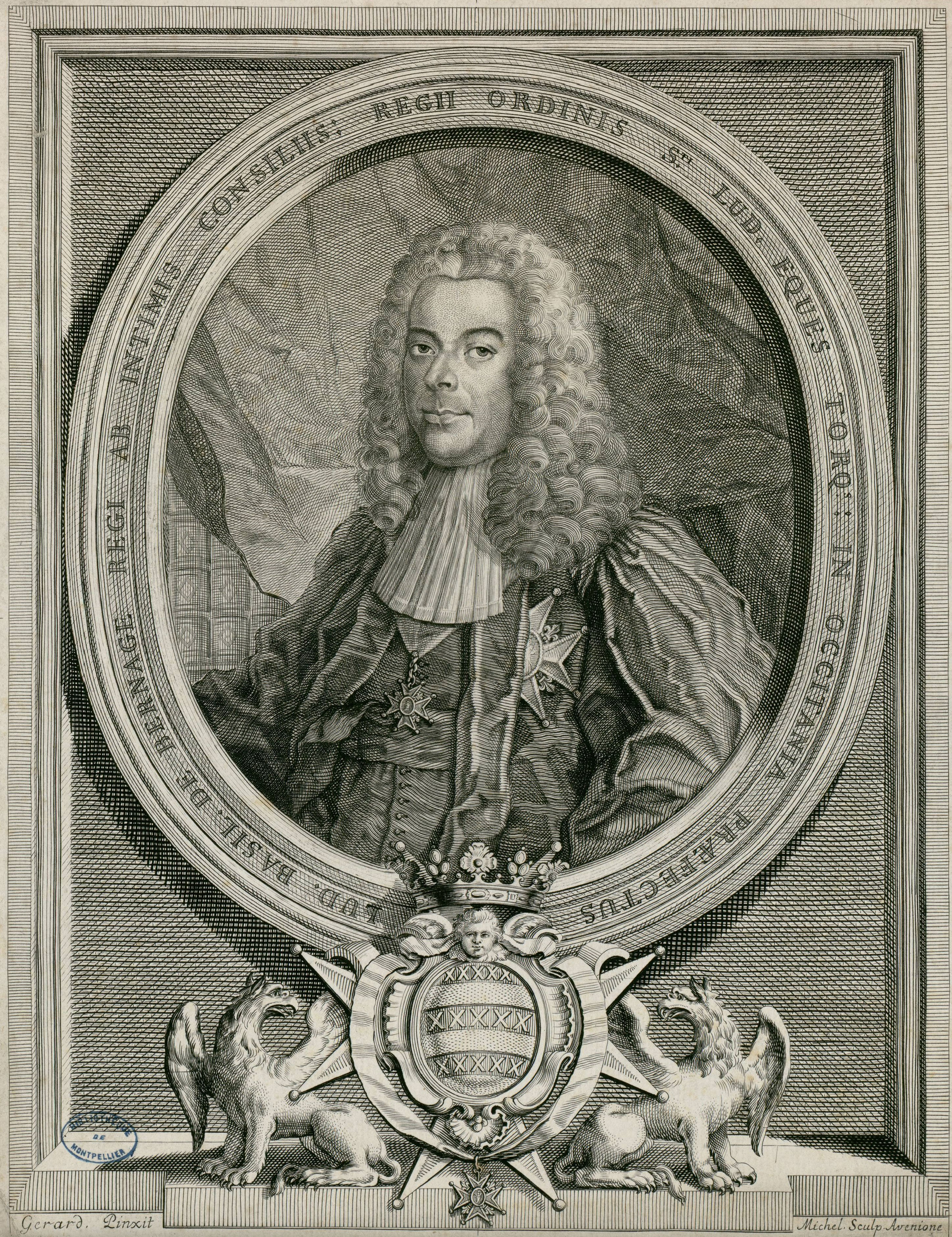 Portrait de Louis-Basile de Bernage de Saint-Maurice (1691-1767)